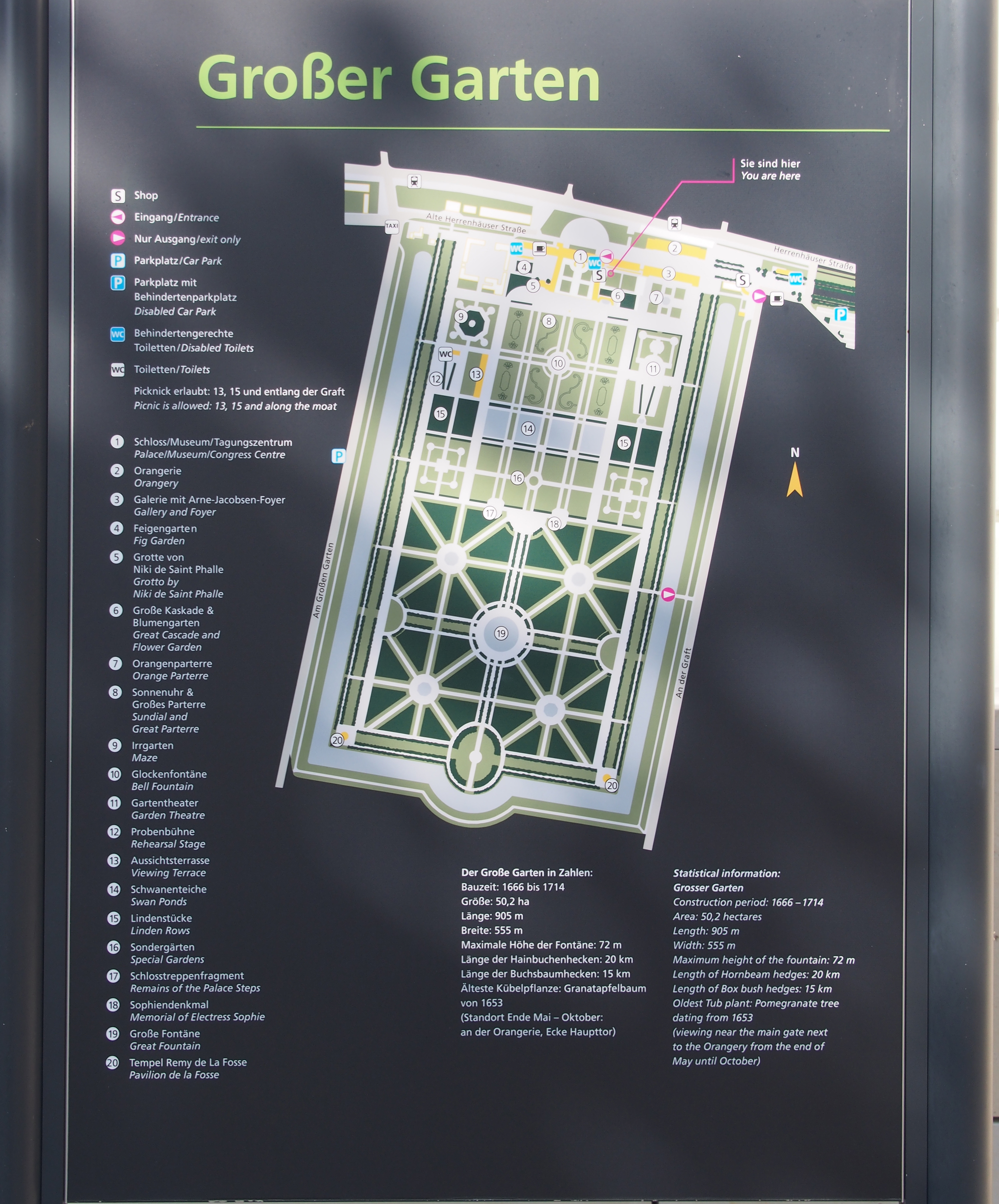 Großer Garten in Hannover Herrenhausen, Übersichtsplan mit Erläuterungen